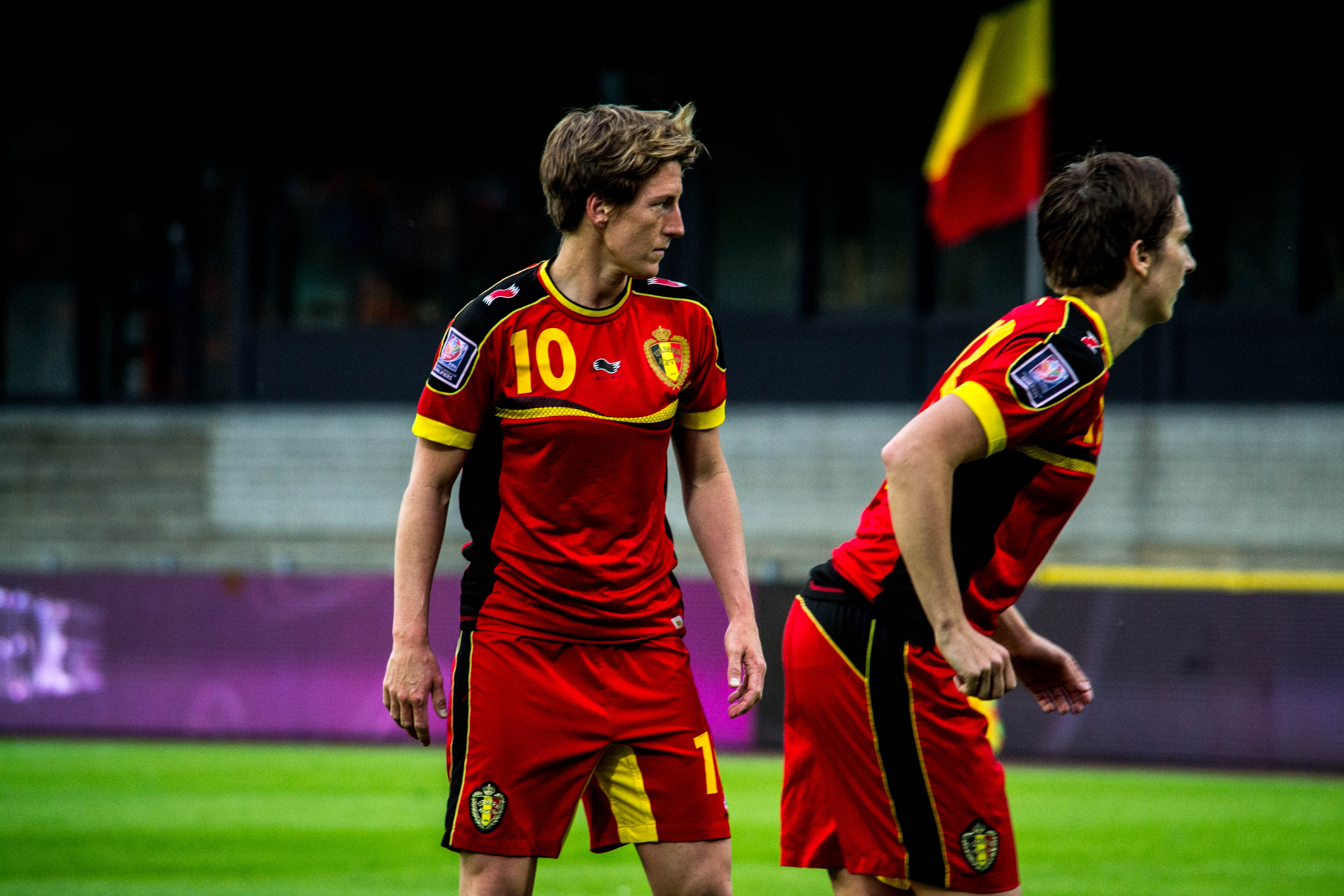 StampMedia